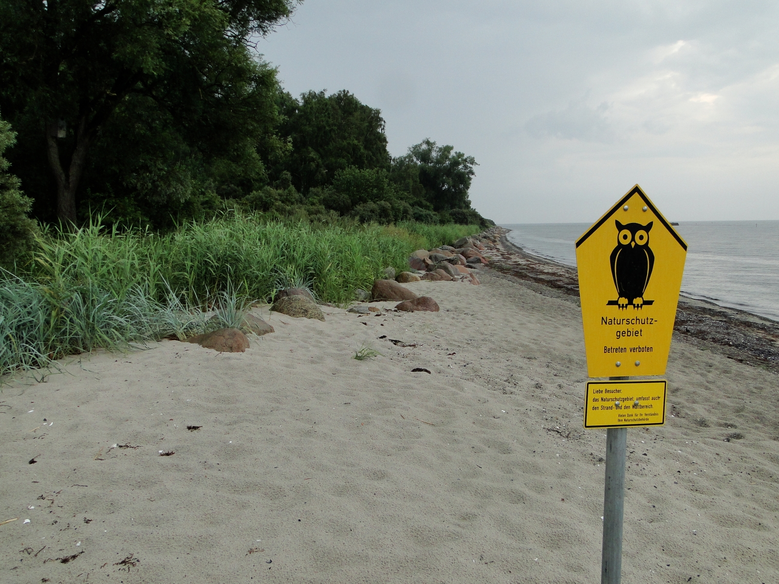 Blick auf das Ostufer des Naturschutzgebiets Tarnewitzer Huk in Mecklenburg-Vorpommern.